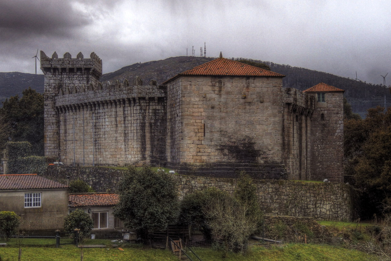 Castelo de Vimianzo - A Coruña